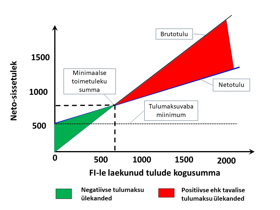 Negatiivse tulumaksu graafiline kujutis täpsustatult